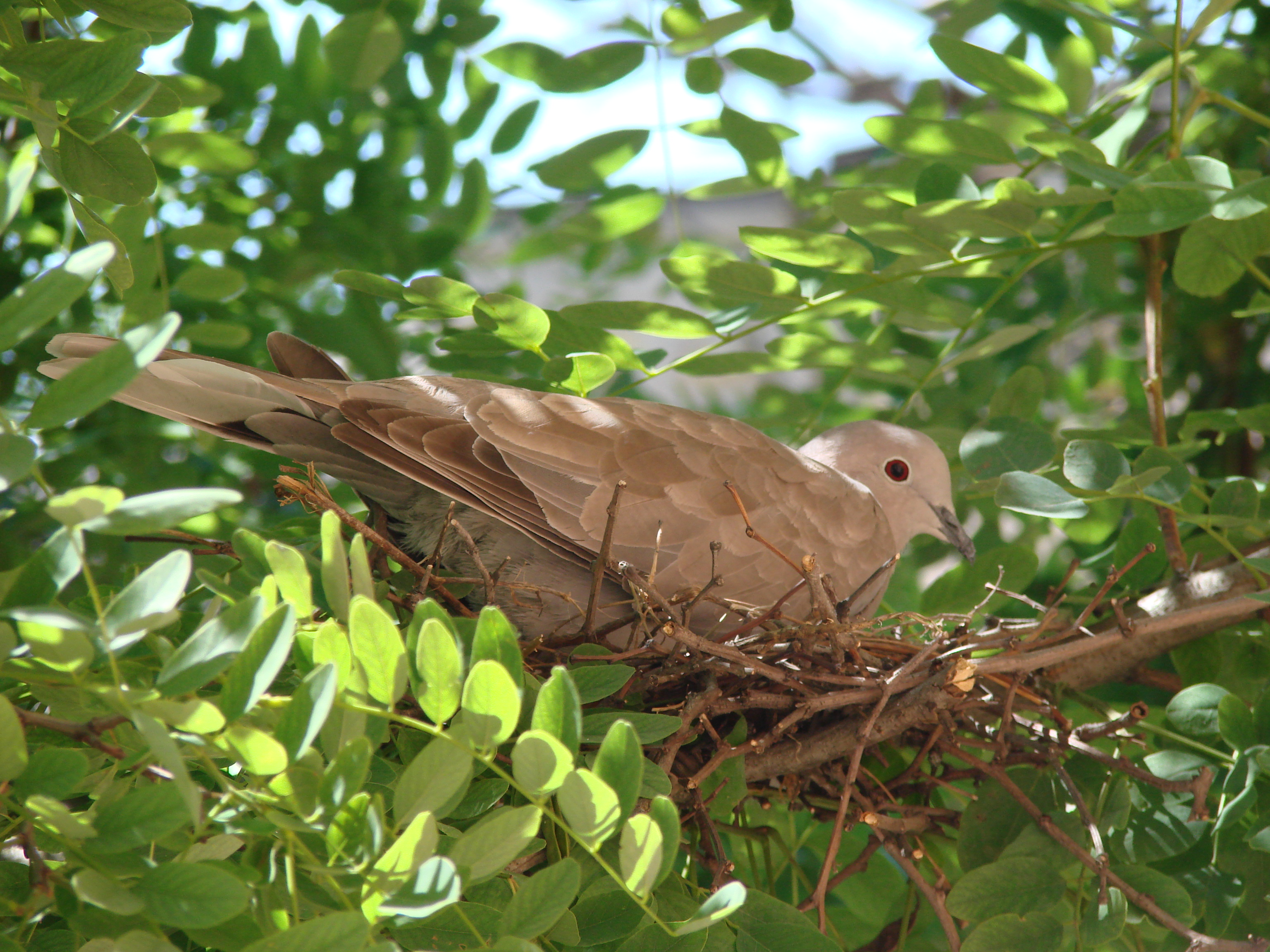 Гнездо кольчатой горлицы на акации